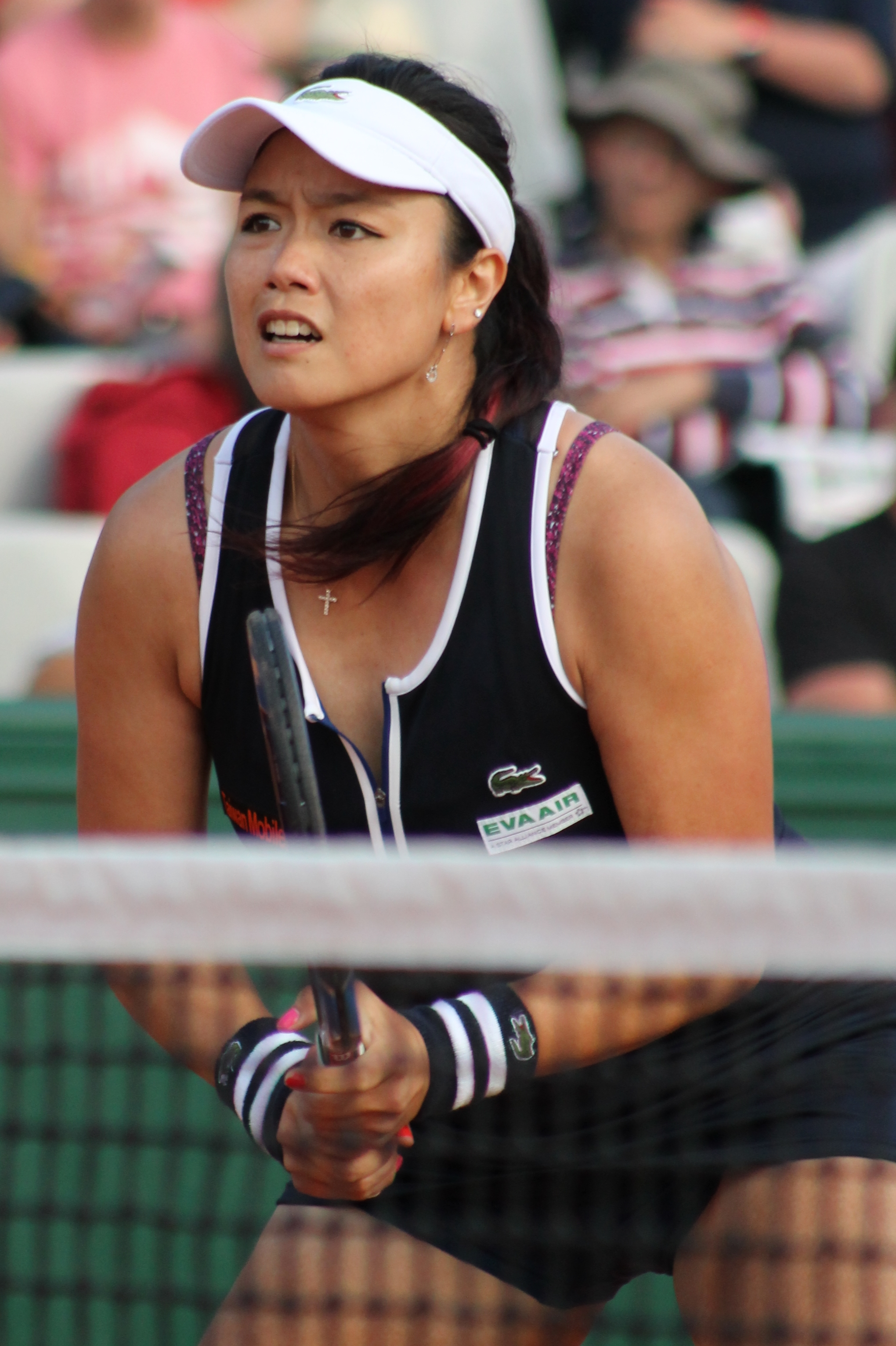 Chan Y.J. RG16 (7)